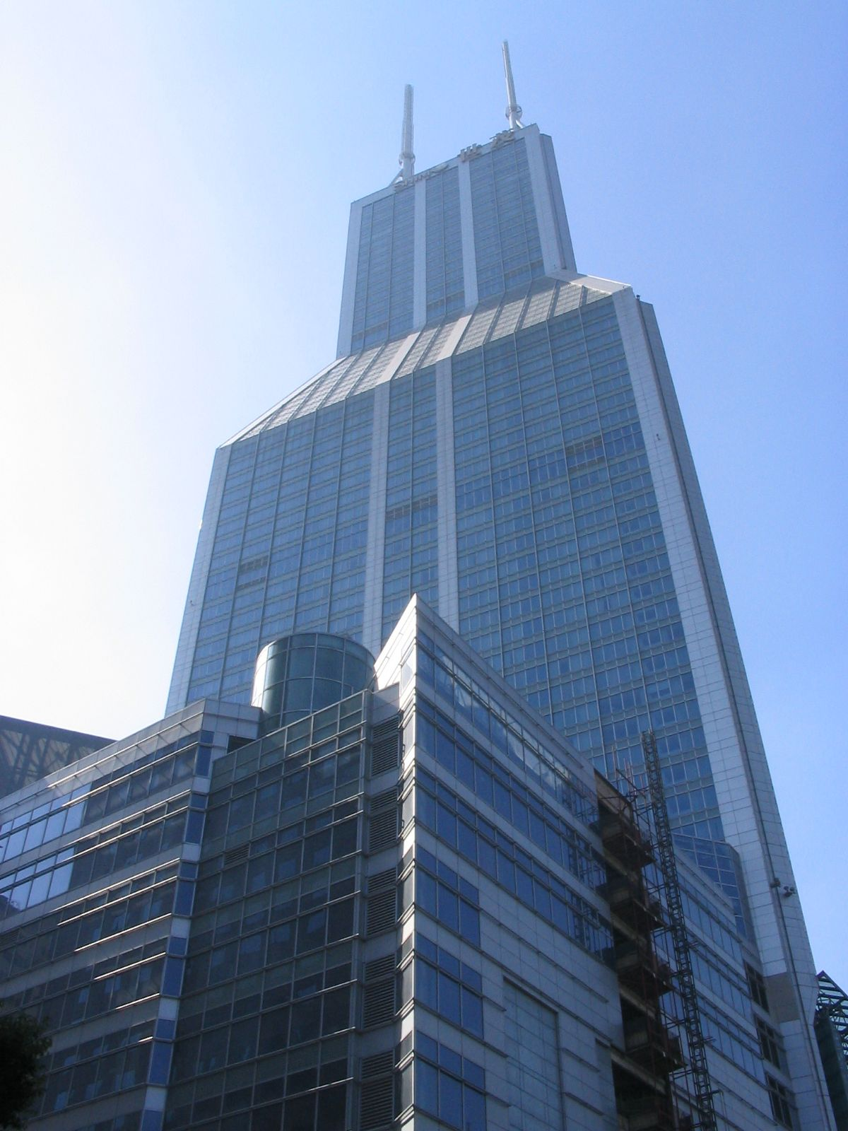 上海世贸国际广场 Shimao International Plaza